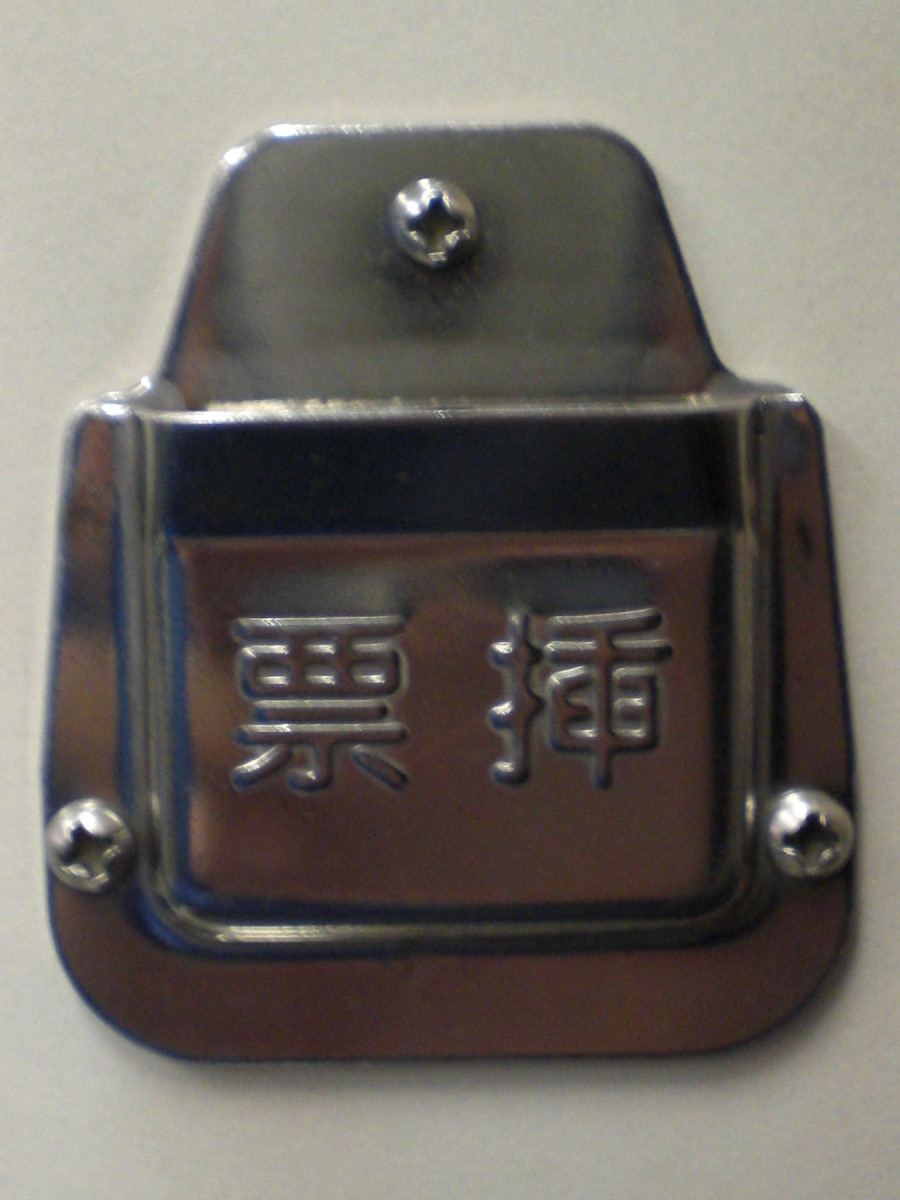 台鐵EMU1200型電聯車的座位前票插